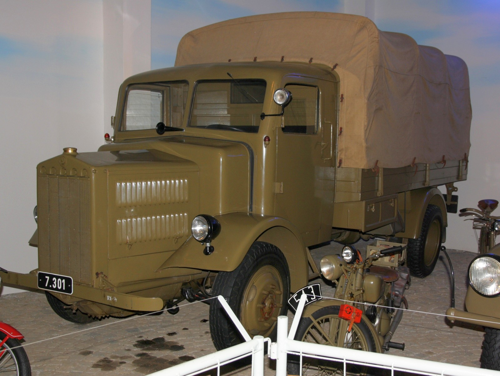 Tatra 27, VTM Lešany.